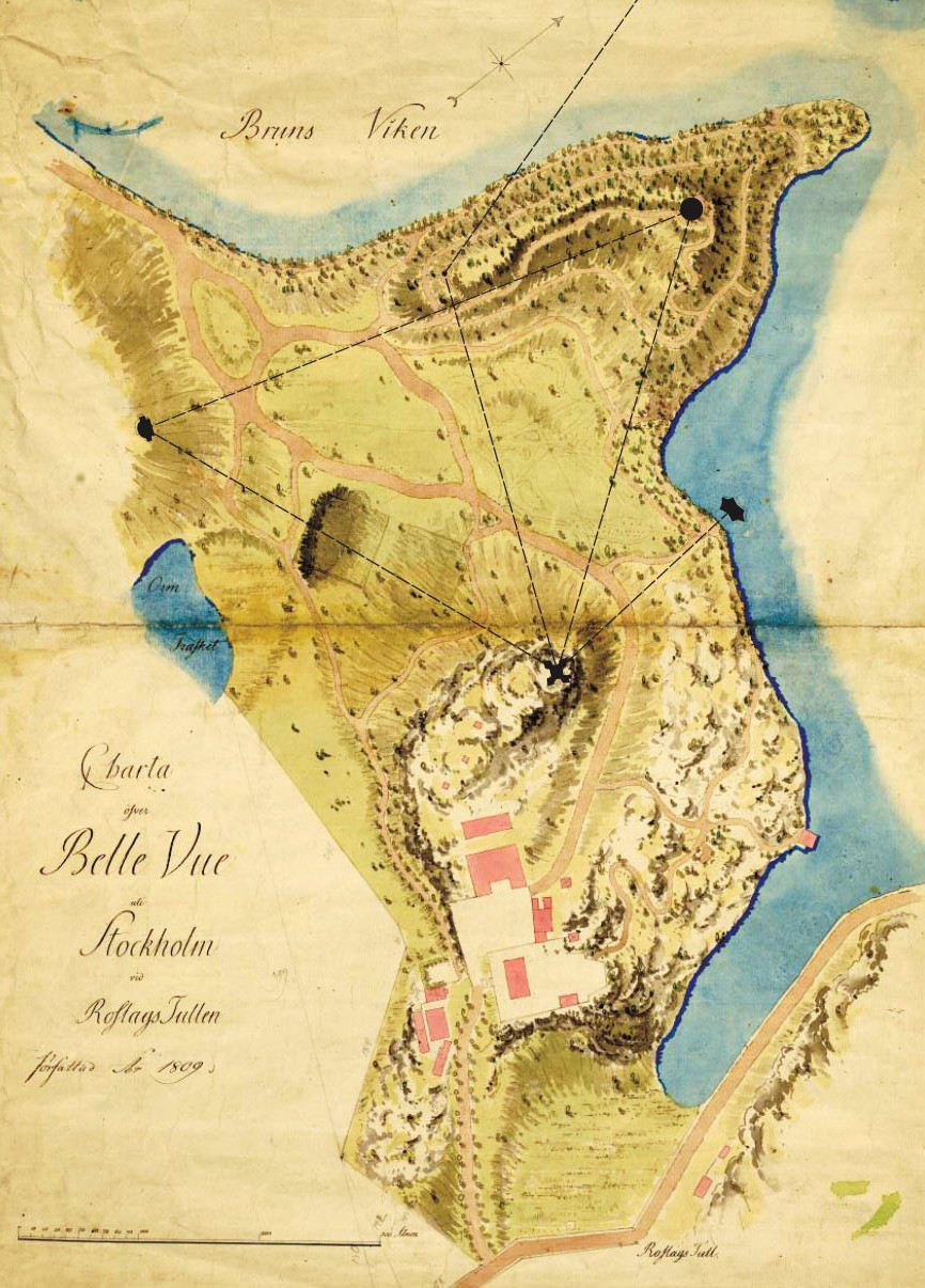 ”Charta öfver BelleVue uti Stockholm vid Roslags Tullen författad år 1809”.